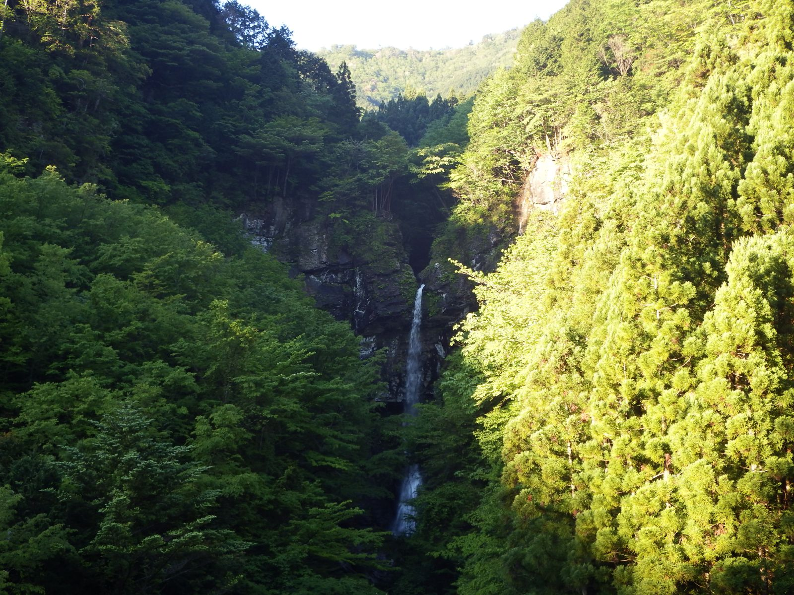 大瀧の滝（高知県いの町）